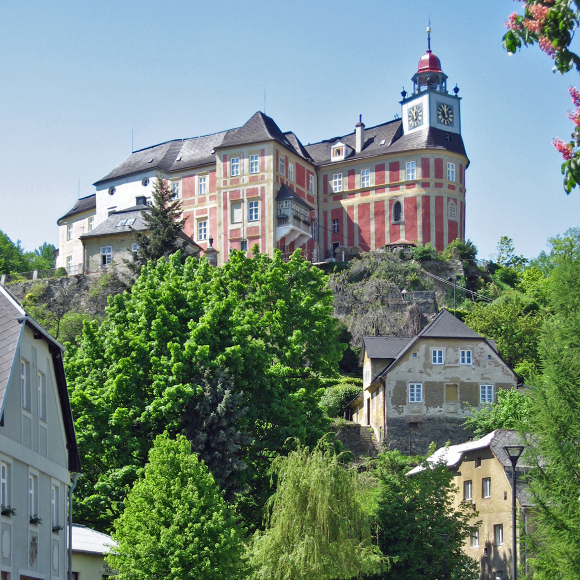 Zamek w Javorniku (Czechy), dawna siedziba biskupów wrocławskich.